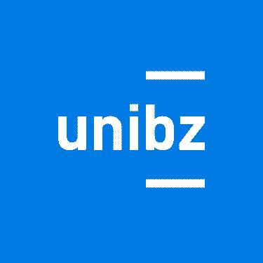 Logo der Freien Universität Bozen